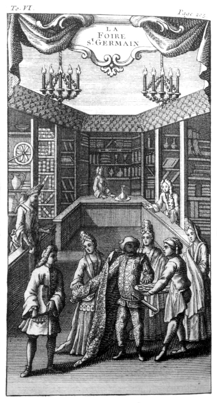 La Foire St. Germain, gravure en taille douce, Le Theвtre italien de Gherardi, 6 tomes, t. 6, Paris: Briasson, 1741